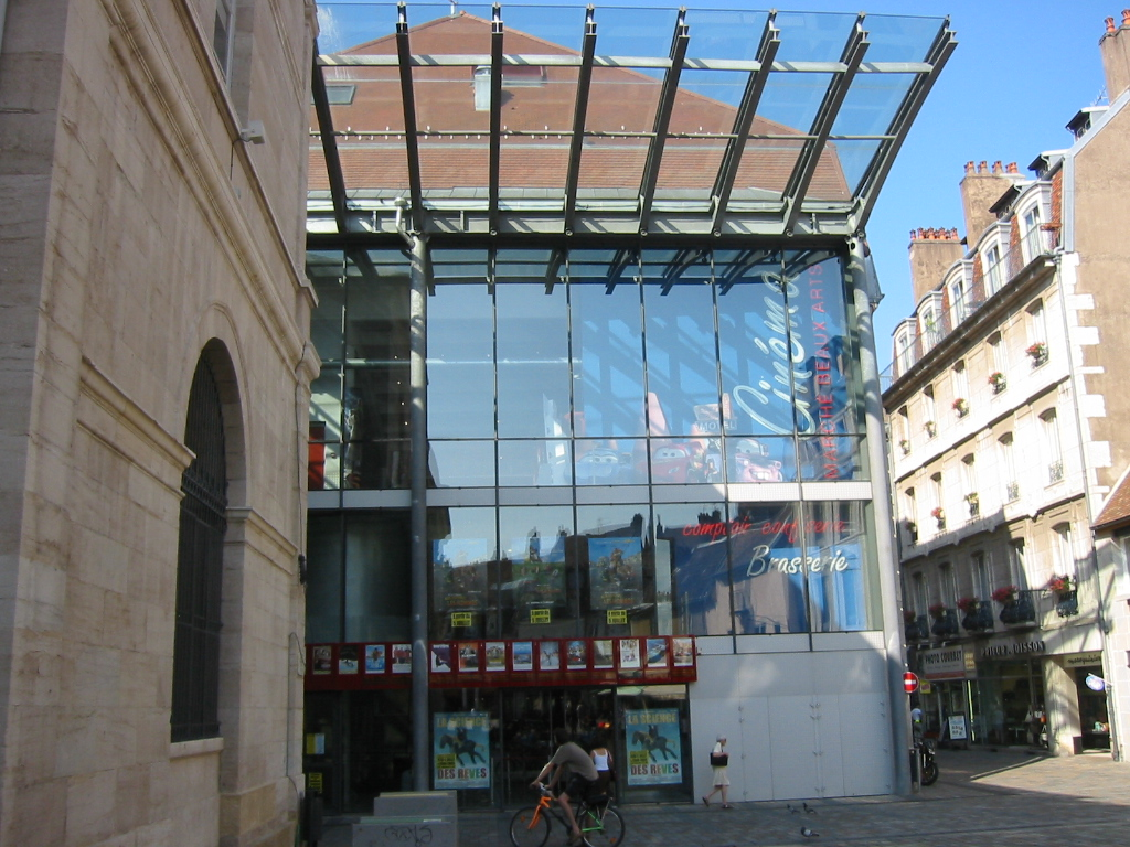 Cinéma des Beaux Art de Besançon